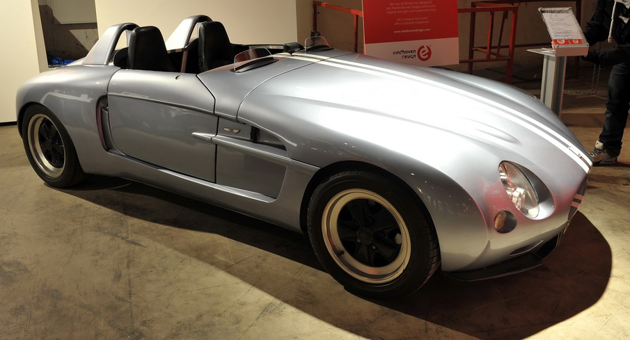 Basis Porsche 944 serie. Vermogen: 163Pk – 350 Pk (afhankelijk van de gekozen motor). Productie in Eindhoven. Sinds feb. 2010 zijn er 12 exemplaren verkocht. CO2 footprint lager dan elke hybride vanwege maximaal hergebruik. Bouwpakket . Je moet wel zelf een donorauto inbrengen. Op bijv. Marktplaats kun je voor ombouw voorbereide Porsches aanschaffen.